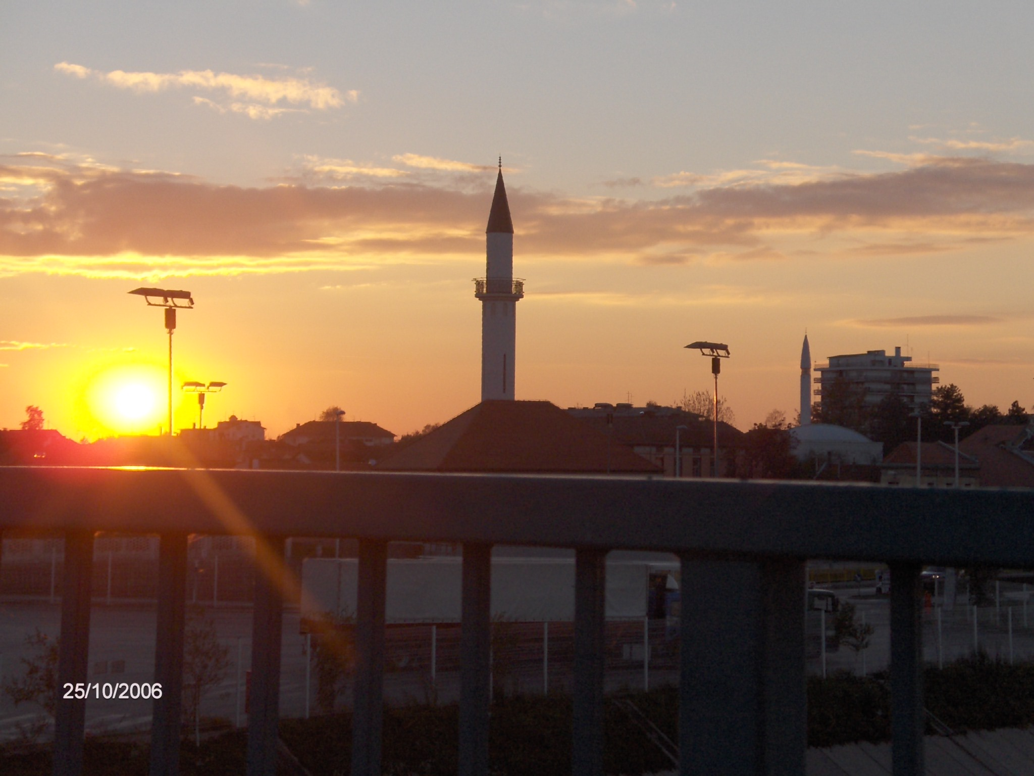 Savska